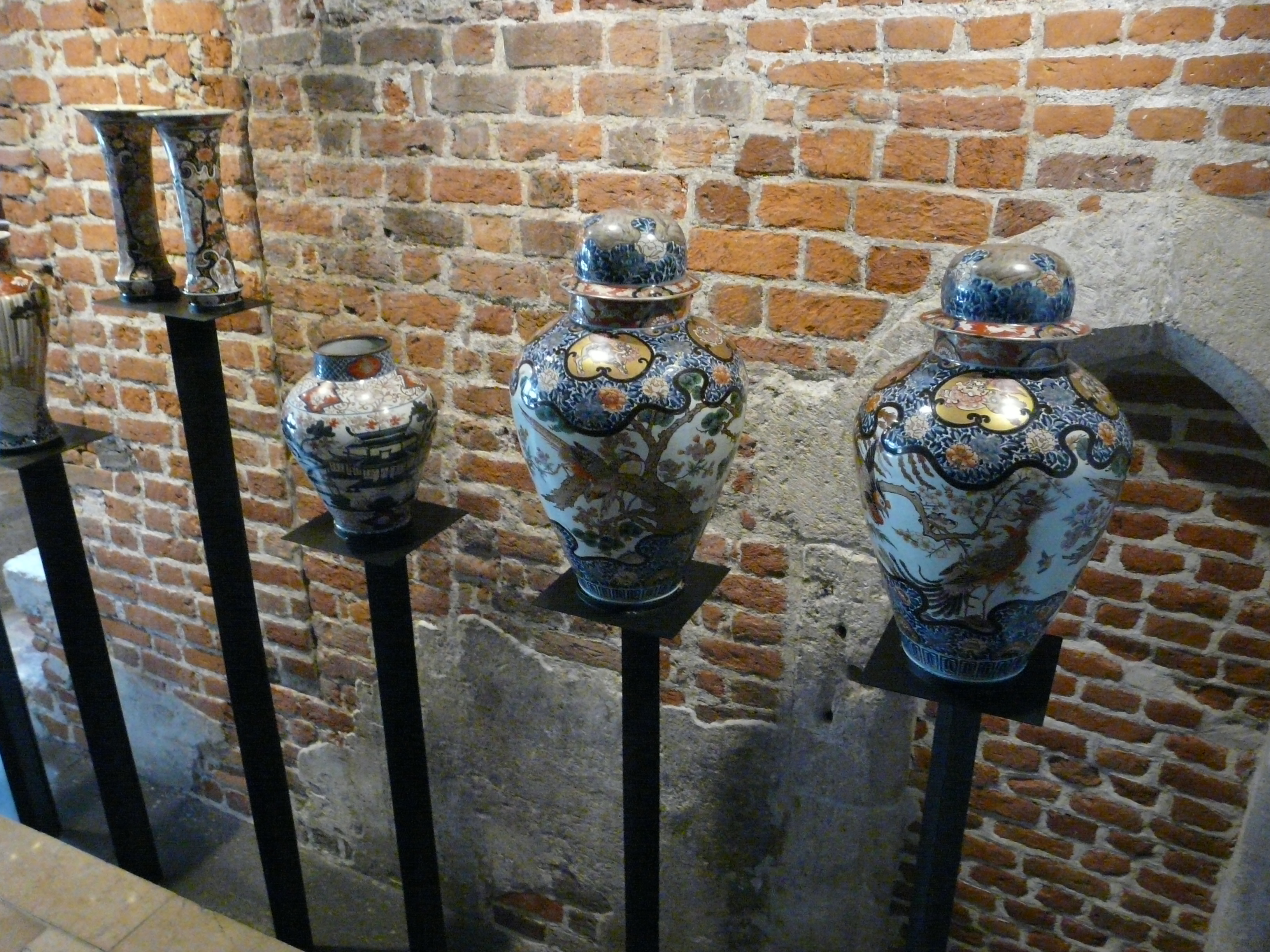 Kraków